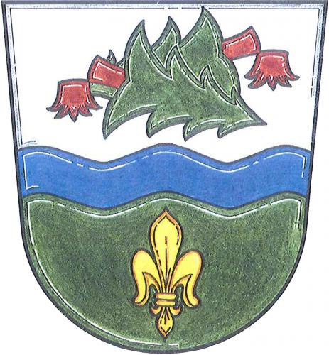 Přísečná znak